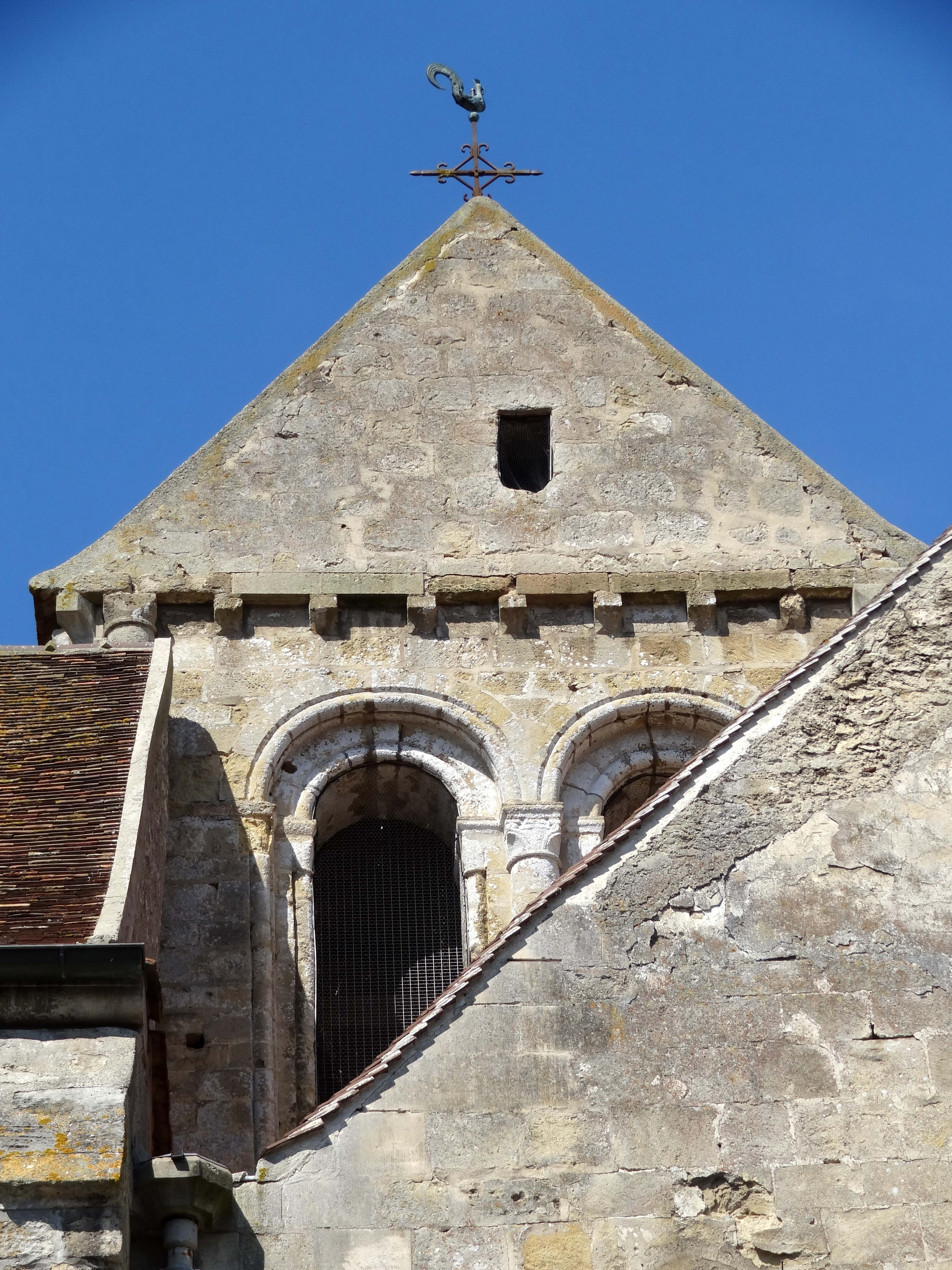 Église Saint-Sulpice de Seraincourt - voir titre.